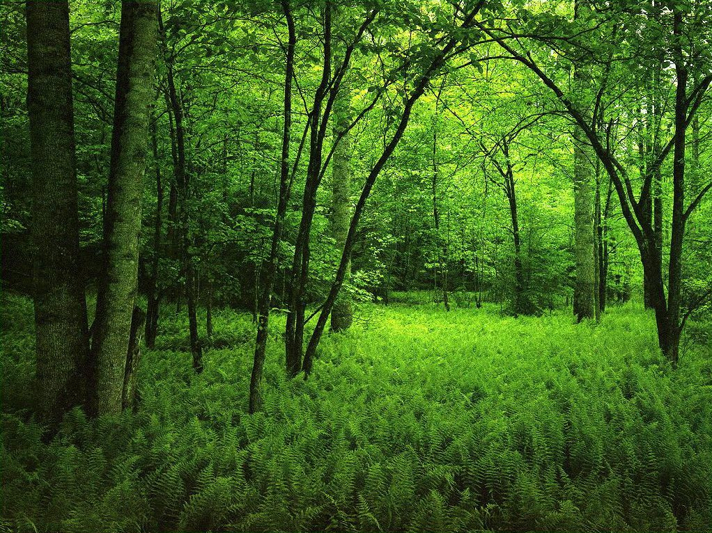 j